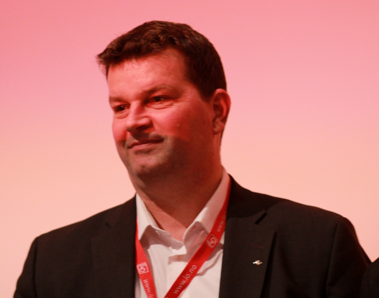 Hans-Christian Gabrielsen, norsk fagforeningsleder